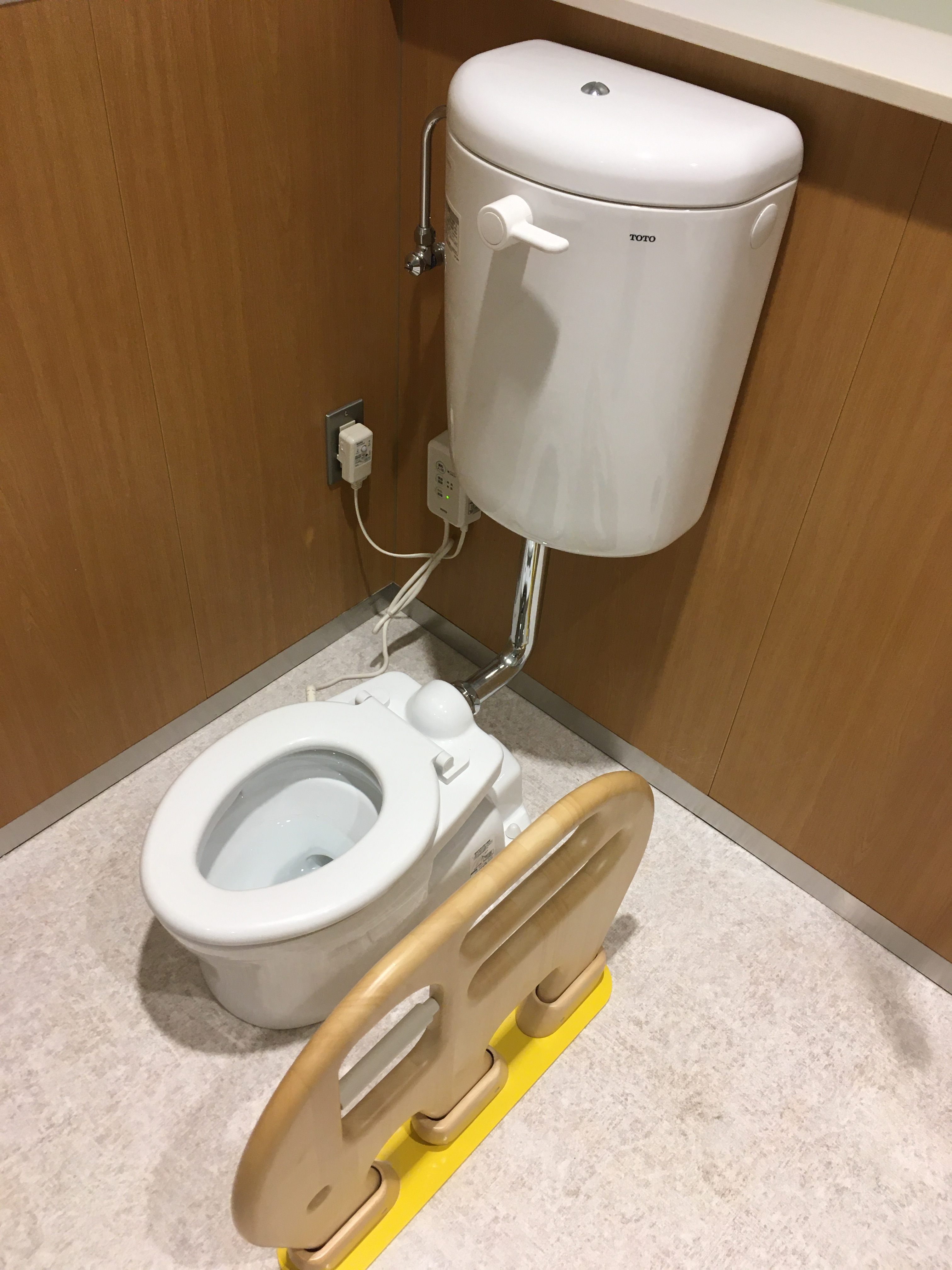 親子トイレに設置された幼児用大便器